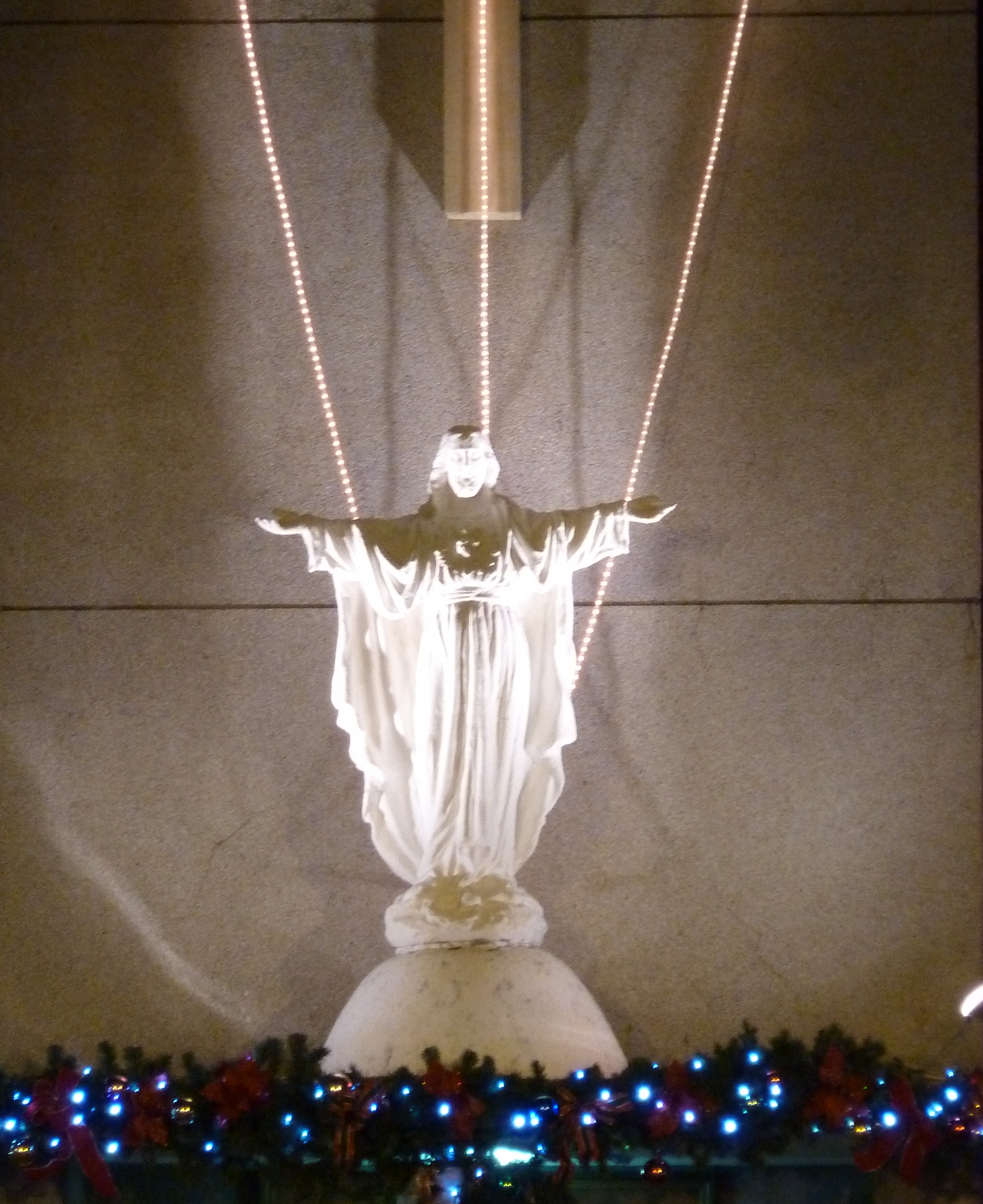 嘉義聖若望主教座堂的耶穌復活聖像